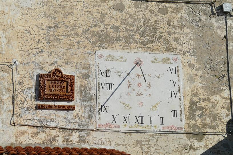 Evigno, Diano Arentino, Liguria, Italia